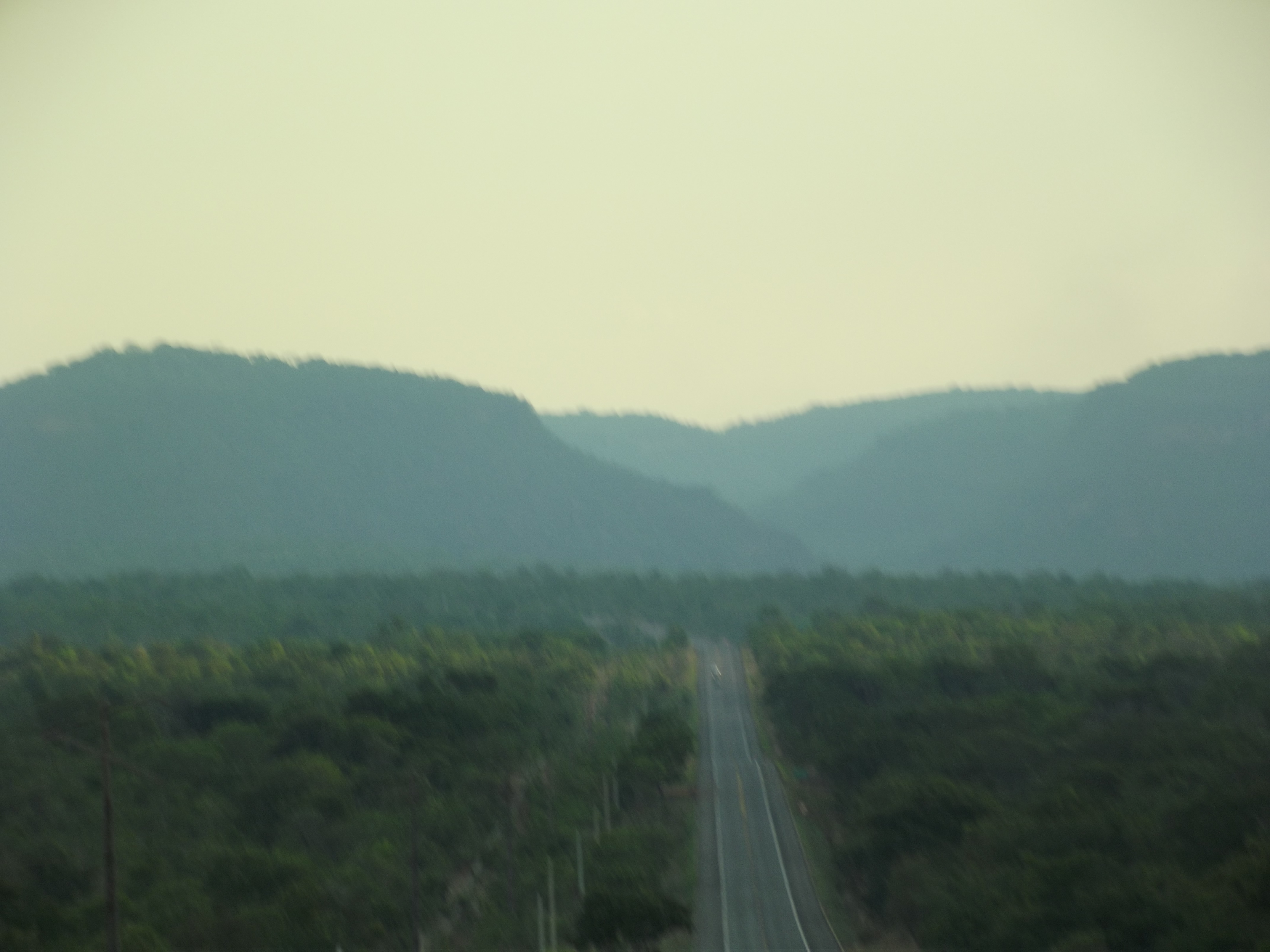 Entrada no Parque Nacional das Chapadas das Mesas Maranhão Br 010 sentido Estreito a Carolina